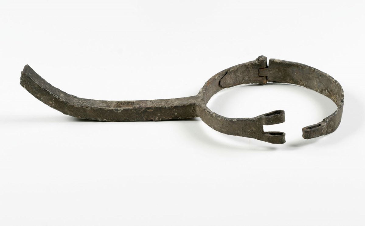 Ett halsjärn funnet på vinden till Börshuset i Gamla stan.